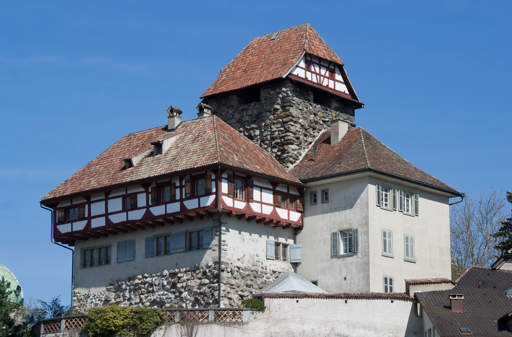 Schloss Frauenfeld mit Historischem Museum des Kantons Thurgau